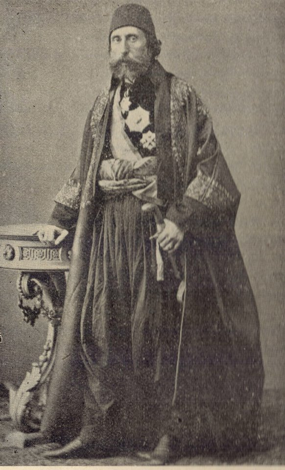 Կարապետ Արթին փաշա Տավուտեան (Տավուտ փաշա) (1816-1868)